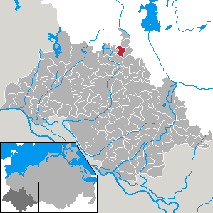 Stralendorf in Mecklenburg-Vorpommern - district Ludwigslust